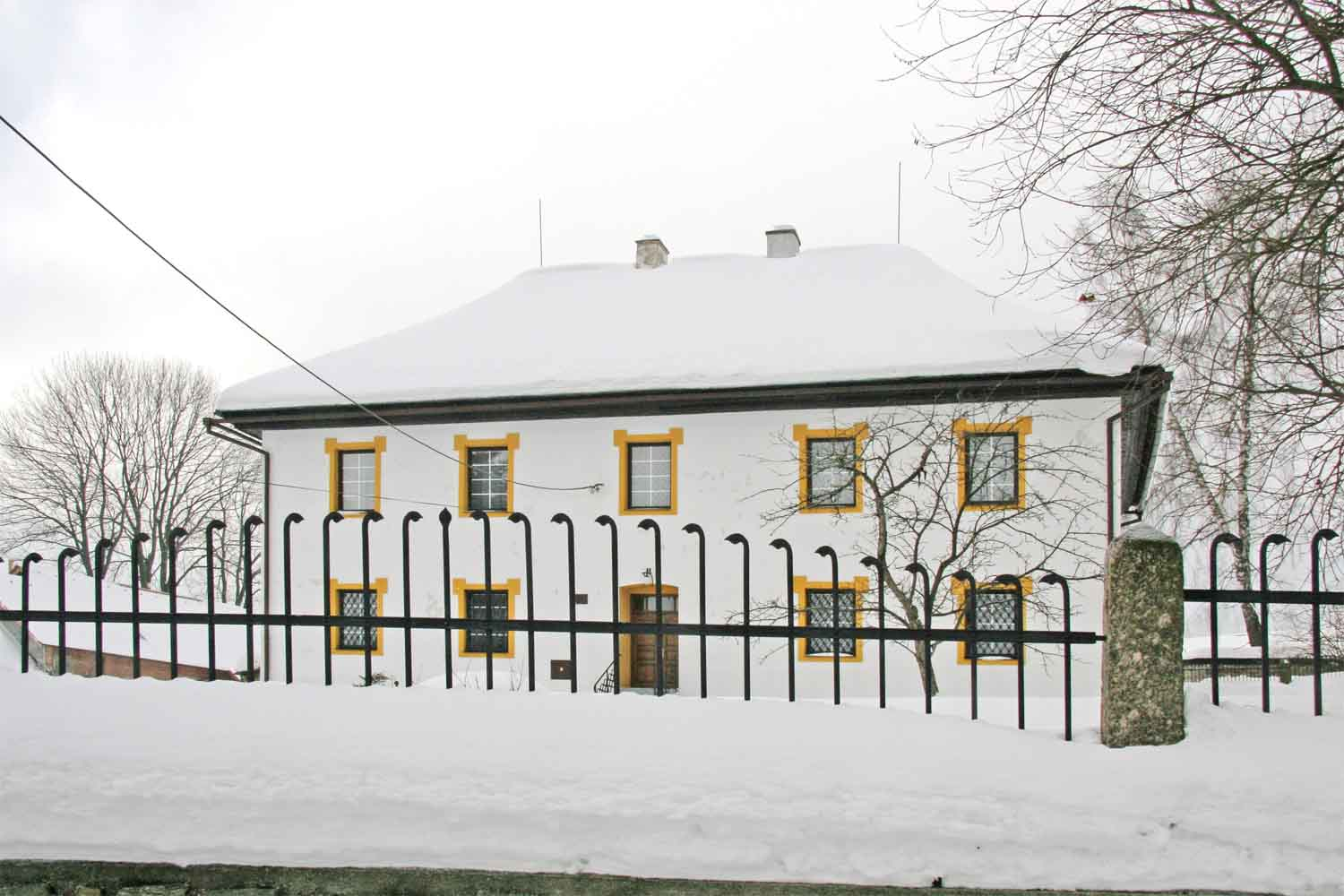 Barokní fara ve Svratce, okres Žďár nad Sázavou